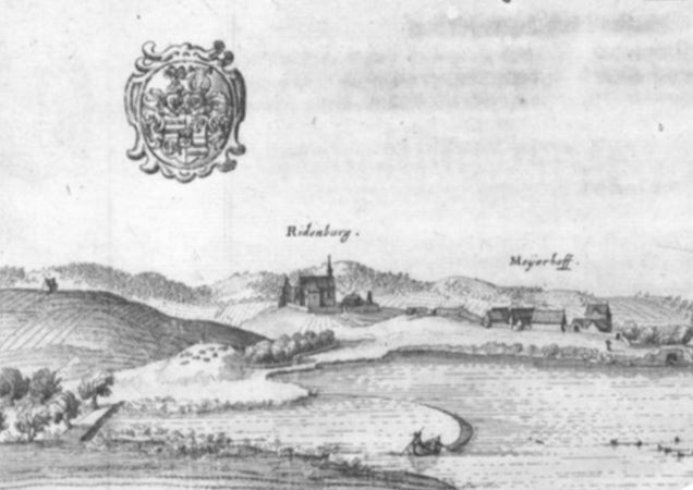 Ausschnitt mit Riedenburg aus dem Merianstich File:Horn (Merian).jpg.